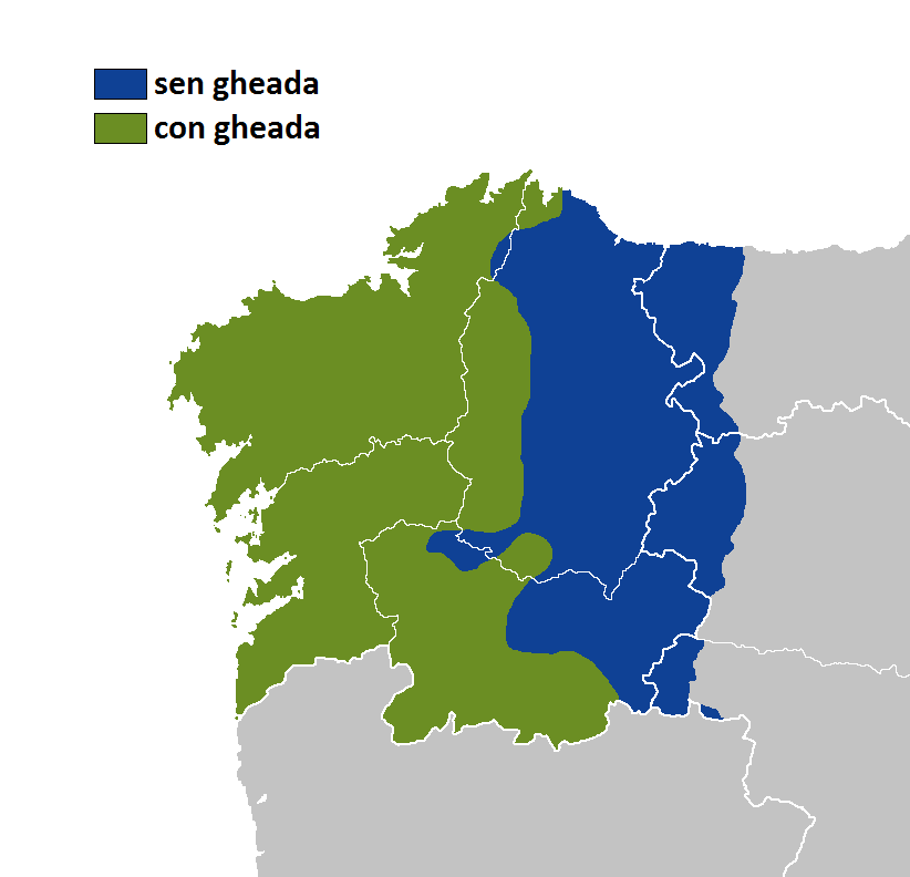 Con presenza de gheada Sen presenza de gheada